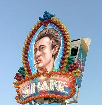 Reklama s portrétem Jamese Deana